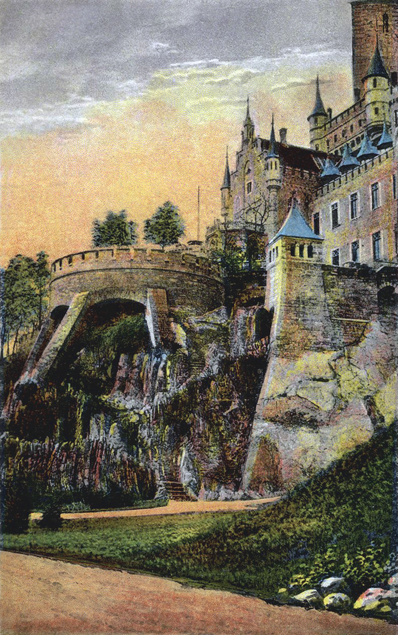 Diese Postkarte vom Südflügel des Schlosses Marienburg wurde um 1920 gedruckt. Als Vorlage der Postkarte diente eine kolorierte Radierung, die möglicherweise schon im letzten Drittel des 19. Jahrhunderts entstanden ist.